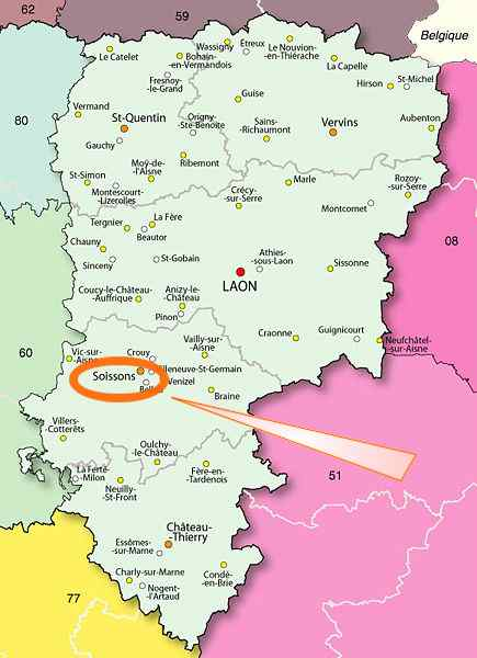 Carte de localisation de Soissons